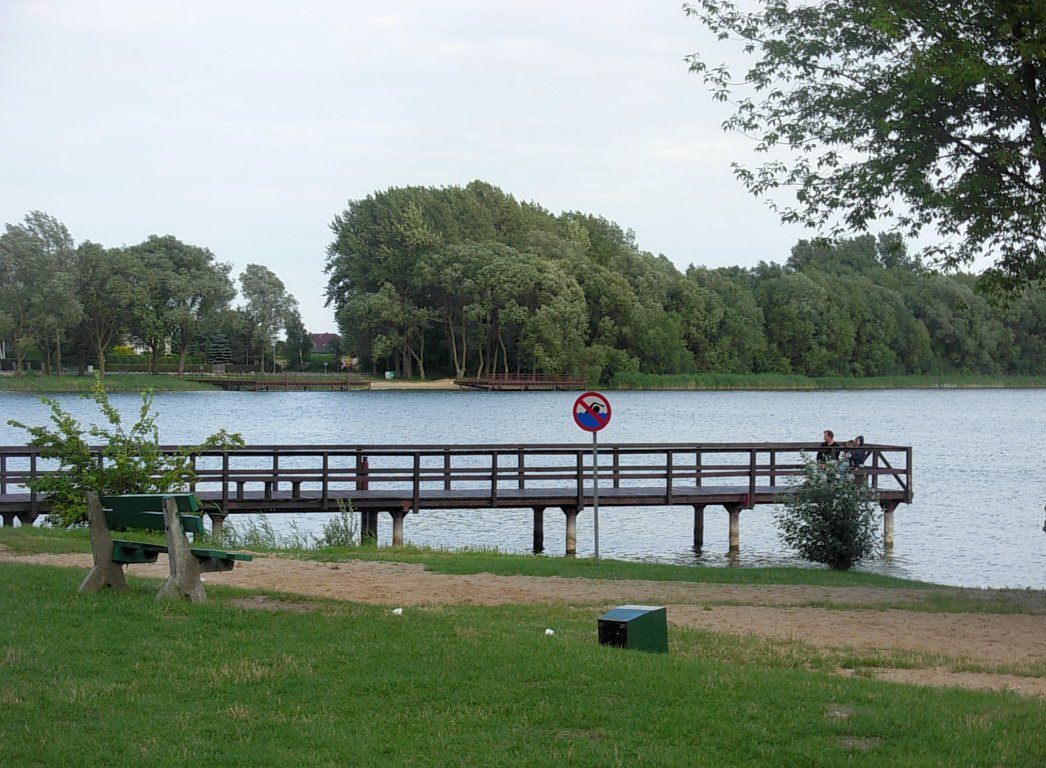 Jezioro Gopło - półwysep rzępowski